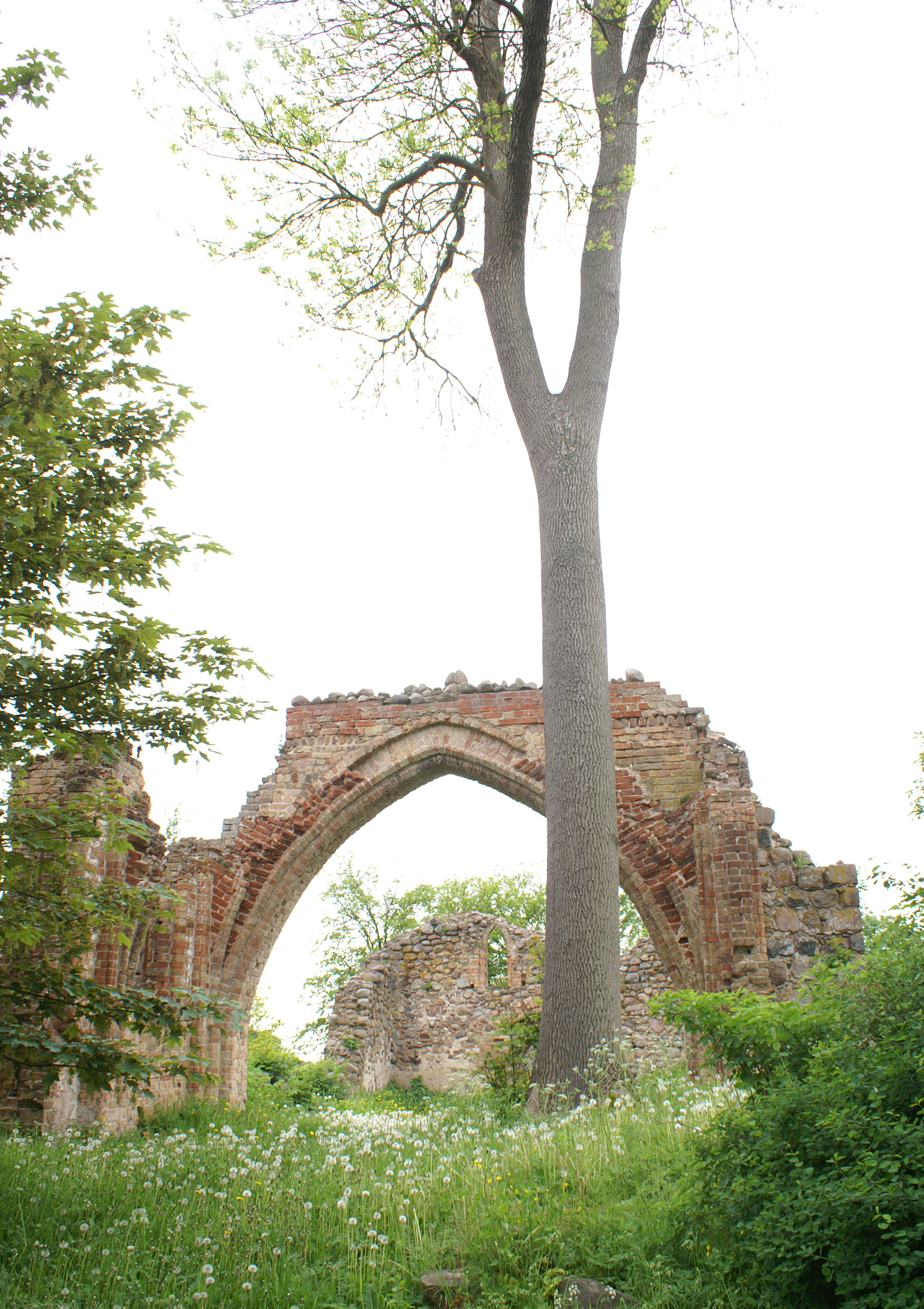 Karlsburg (Landkreis Ostvorpommern) - Ortsteil Steinfurth - Kirchenruine